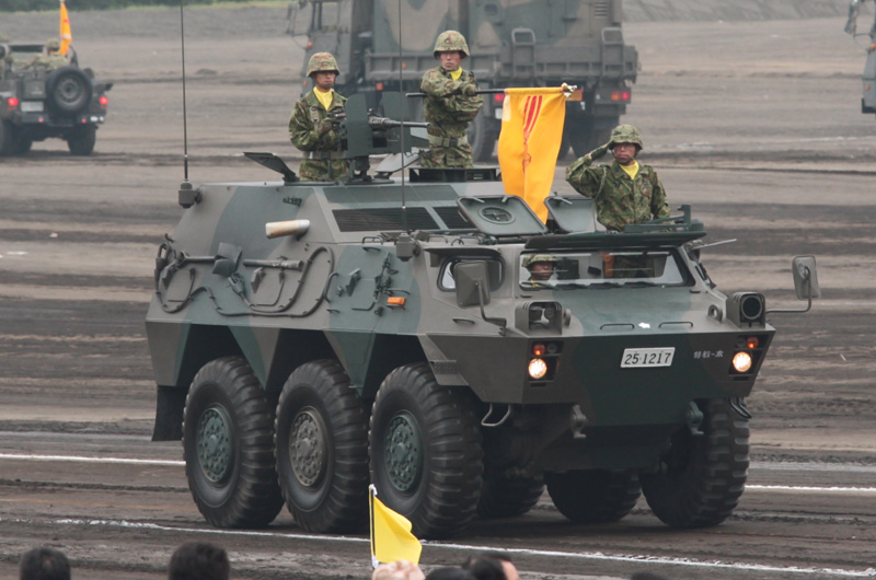 特科教導隊本部管理中隊の82式指揮通信車。創立記念行事にて。